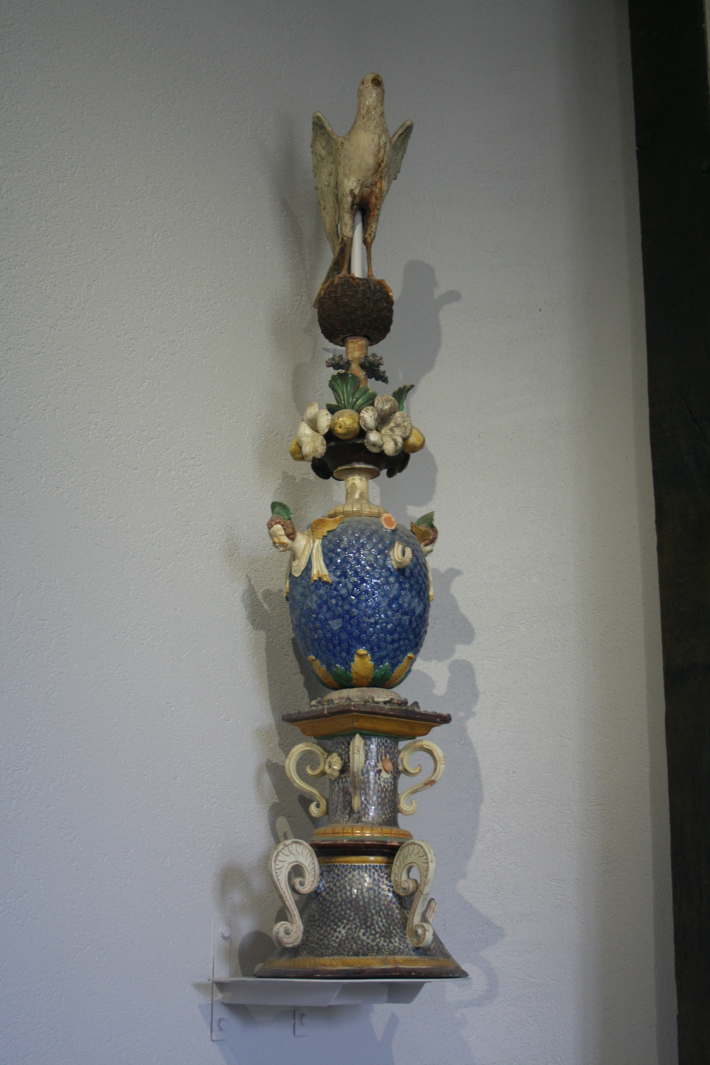 épi de faitage du pays d'Auge